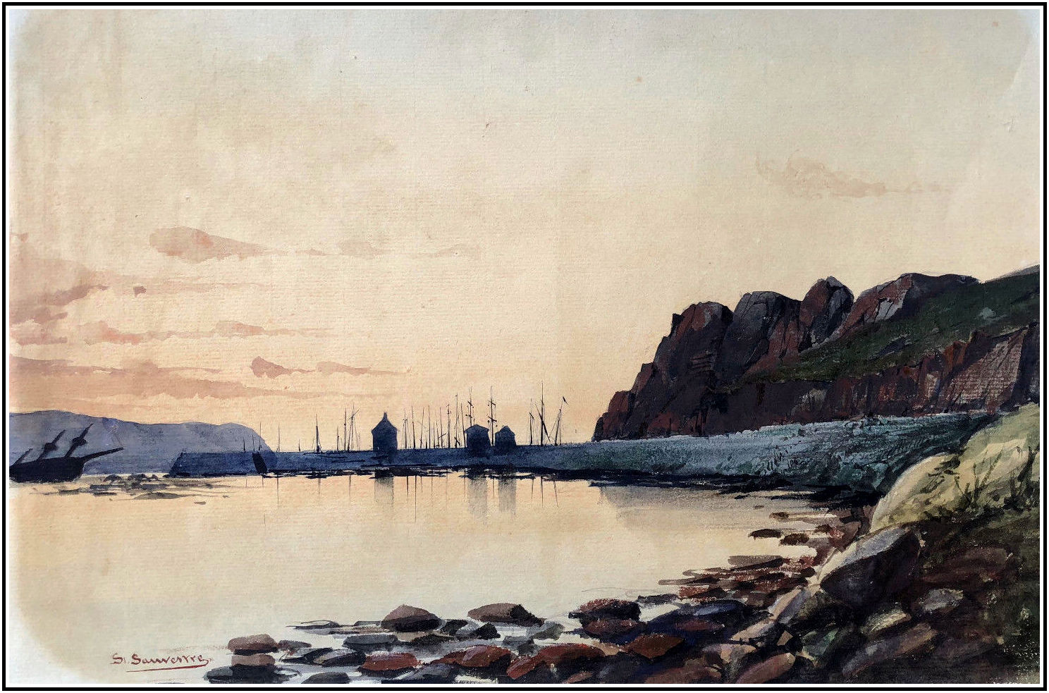 Стефан Совестр (1847-1919). Берег Бретани. Акварель, 1870.